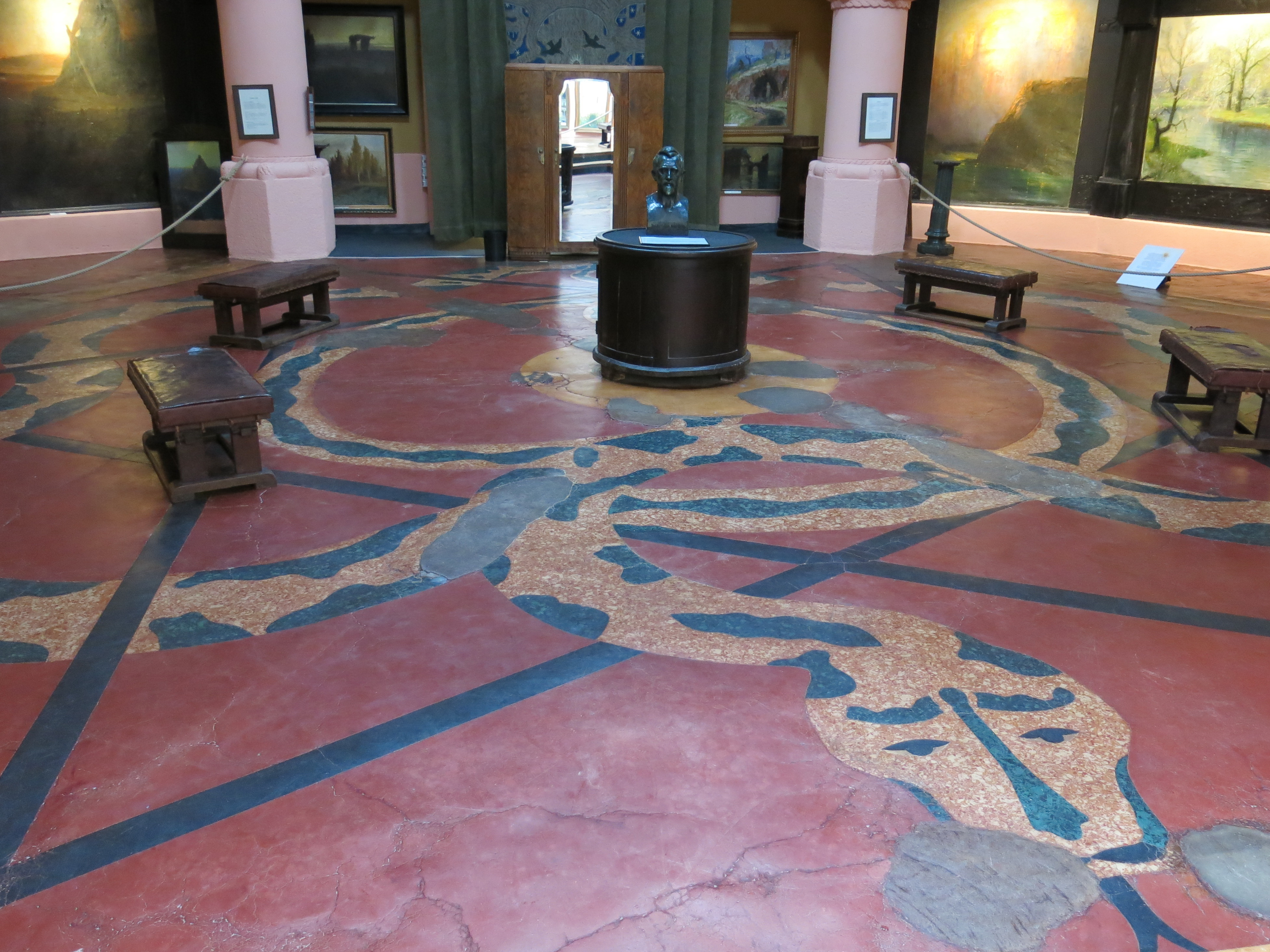 Nibelungenhalle, Drachenfelsstraße 107, KönigswinterInnenraum der Halle mit zwei der insgesamt sechs Säulen, die die Kuppel tragen. In den sechs Hallennischen sind zwölf Großgemälde, die den Opernzyklus Ring des Nibelungen mit seinen vier Bühnenwerken Rheingold, Walküre, Siegfried und Götterdämmerung malerisch interpretieren, zu sehen. Auf dem Boden, der aus Xylolith besteht – einer Mischung aus Magnesium-Mörtel, Sägemehl und Farbe – ist eine Darstellung des Kosmos zu sehen. Eine im Zentrum gelegene Erdscheibe wird von einem Hexagramm eingeschlossen. Das Hexagramm besteht aus zwei Dreiecken, Symbolen für Wasser und Feuer. Um die Erdscheibe windet sich die 60 m lange Midgardschlange.